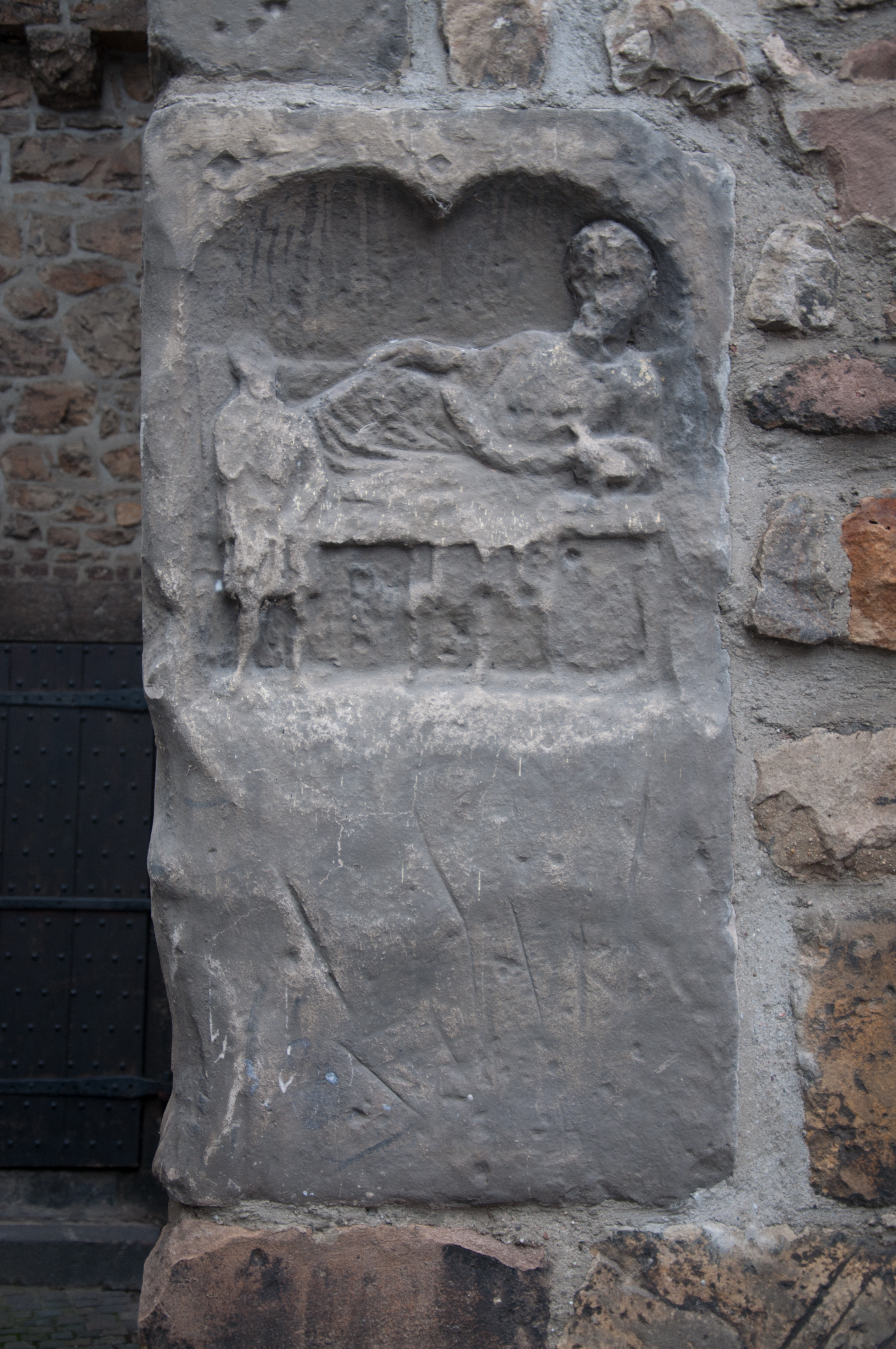 Romeinse grafsteen met dodenmaaltijd-motief, ingemetseld in de Hexenturm van Jülich.